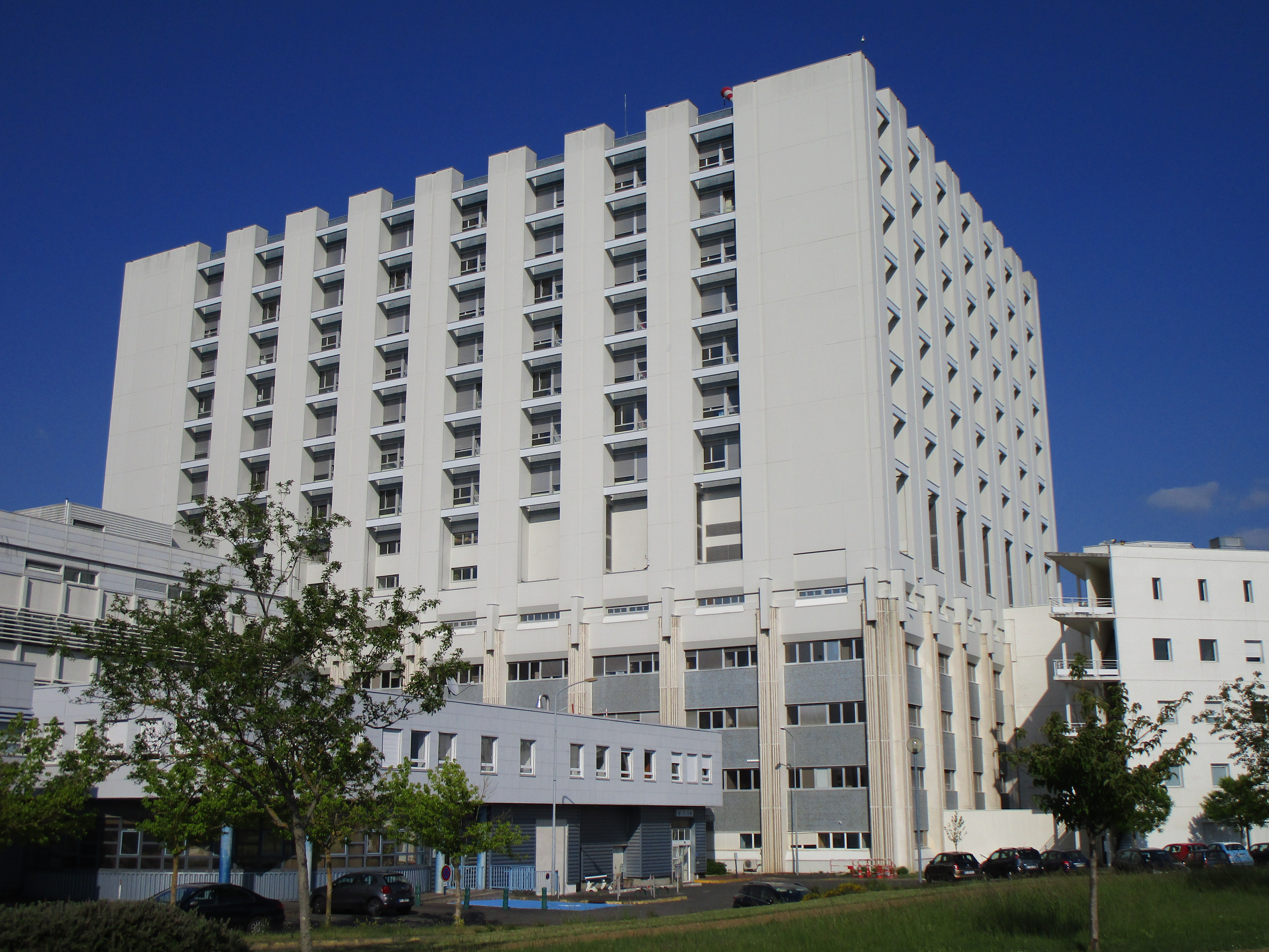 Vue de l’hôpital Trousseau (CHU Tours) à Chambray